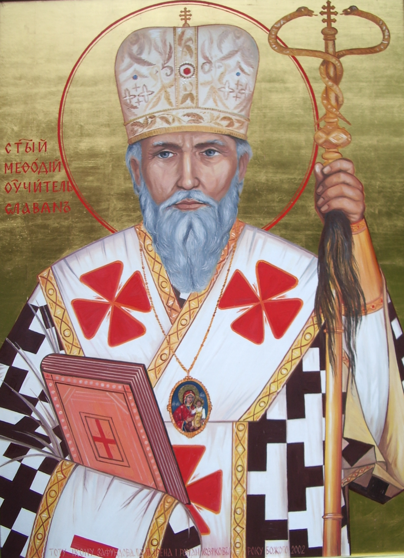 Metod, učiteľ Slovanov, baziliánsky monastier Prešov, Slovensko. Photo taken by Jozafát Vladimír Timkovič, OSBM